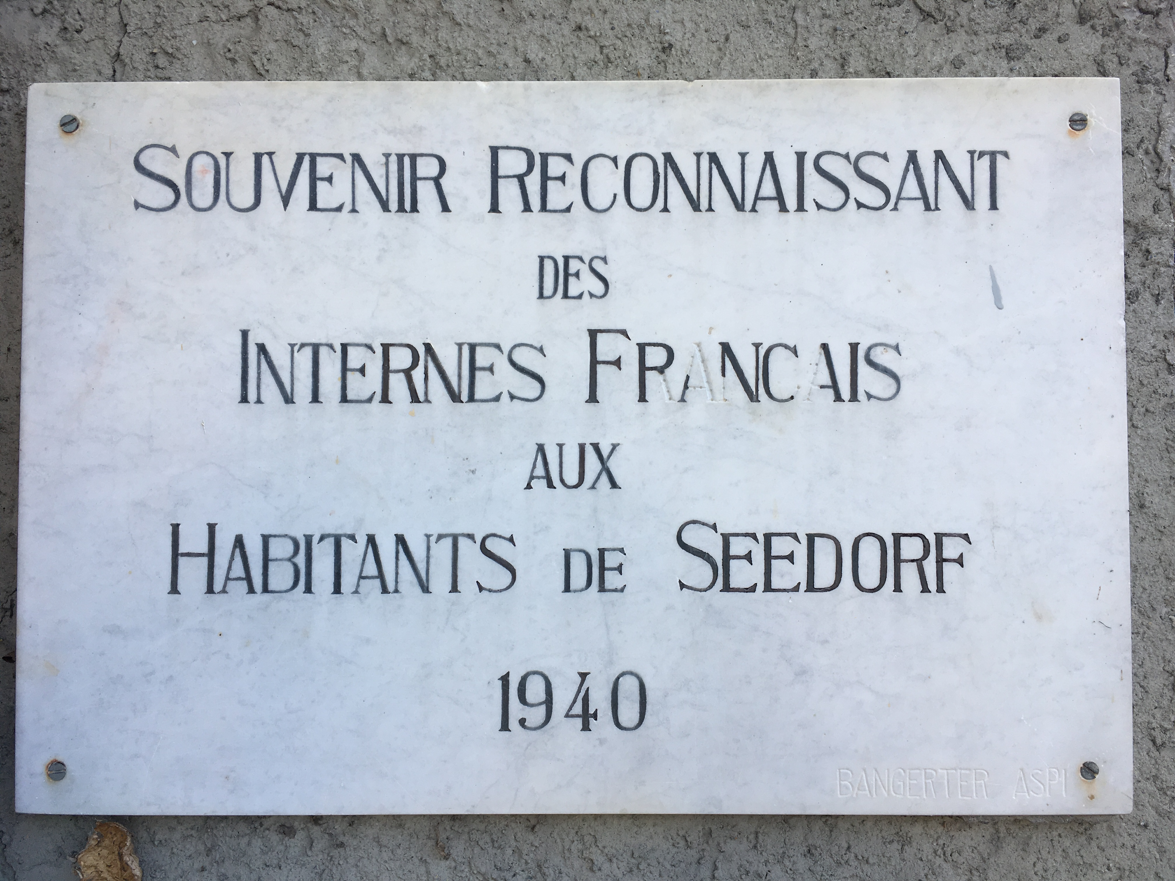 Tafel zur Erinnerung an die Internierung von Franzosen in Seedorf/BE 1940.